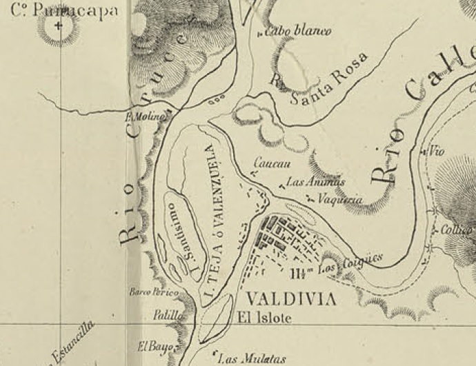 Valdivia e Isla Teja en el Mapa de la Expedicion de Francisco Vidal Gormaz en libro Continuación de los trabajos de esploración del Río Valdivia i sus afluentes de 1869